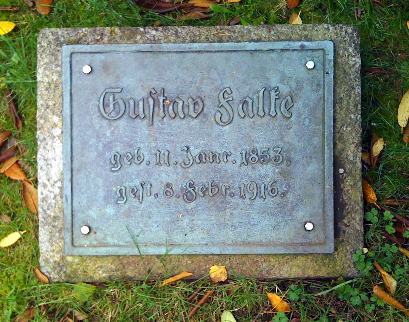 Grabmal des Dichers Gustav Falke auf dem Ohlsdorfer Friedhof (AC 7). Dort sind seine Kinder und auch der Schwiegersohn Richard Luksch beerdigt.